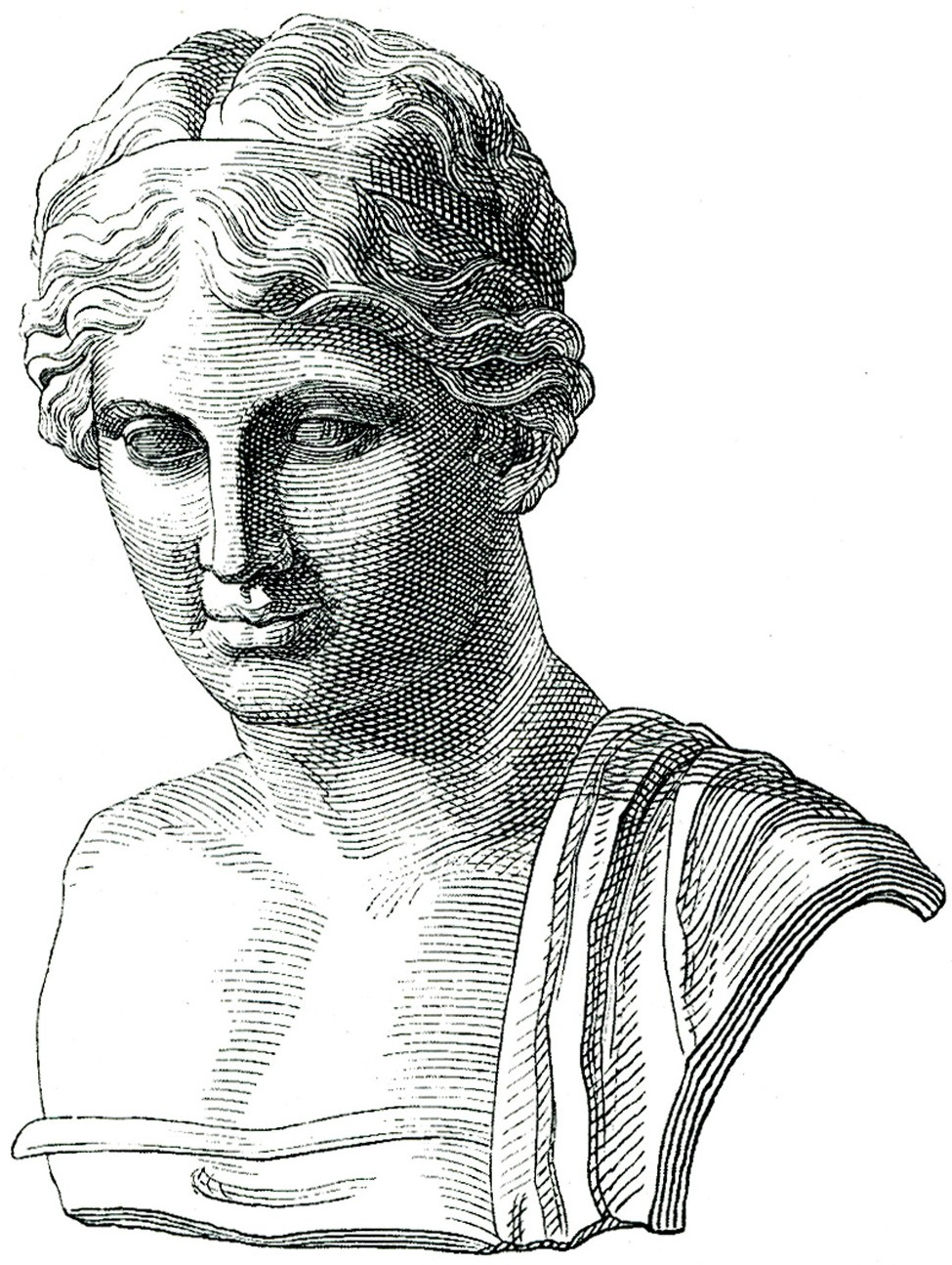 Ιάκωβος Φάλκε. Ελλάς, ο Βίος των Αρχαίων Ελλήνων. Κατά το γερμανικό του Ιακώβου Φάλκε, Ν. Γ. Πολίτης (μετ.), Αθήνα, Κάρολος Βίλμπεργκ, 1887